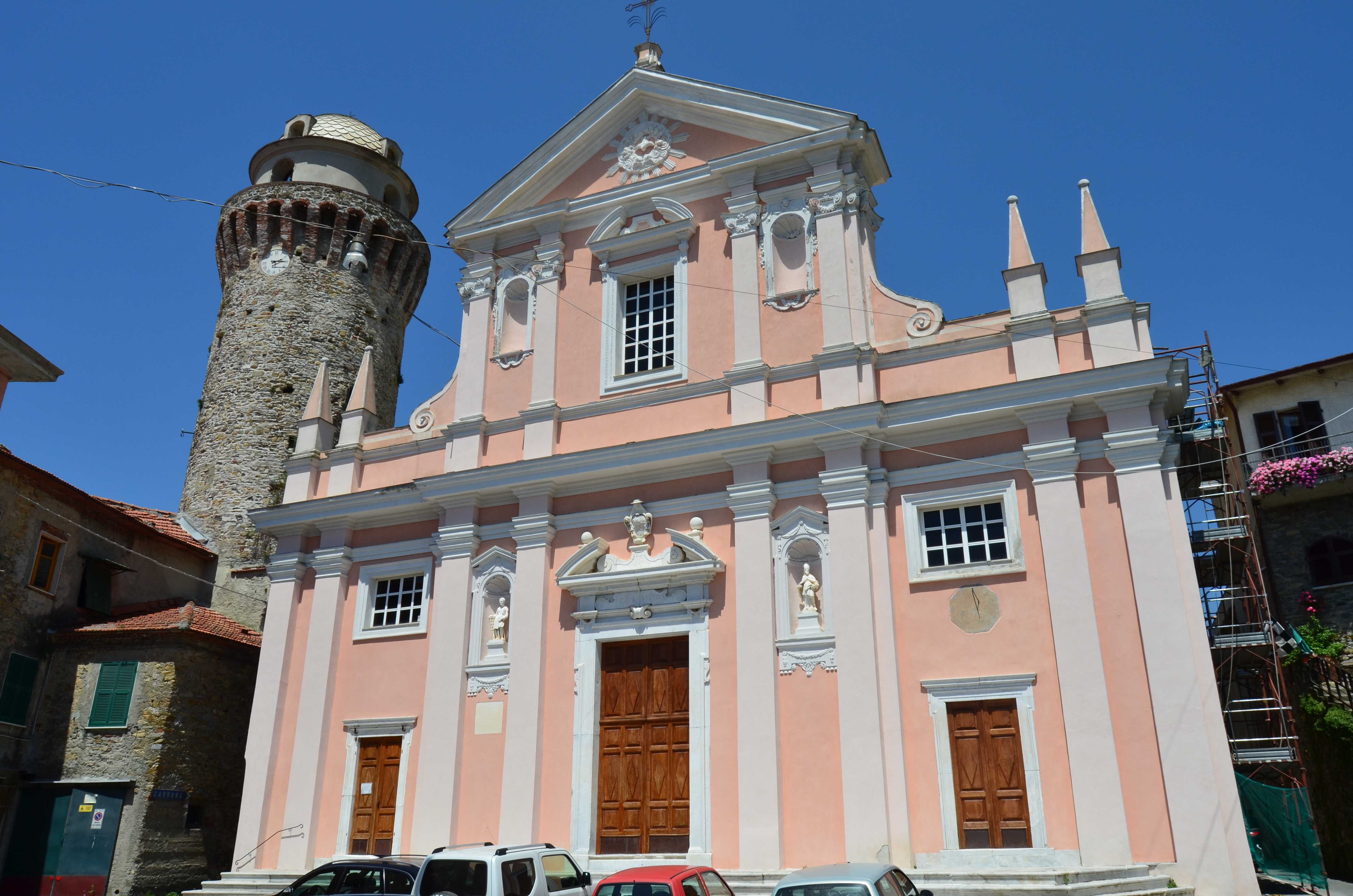 Chiesa di San Lorenzo, Ortonovo, Liguria, Italia